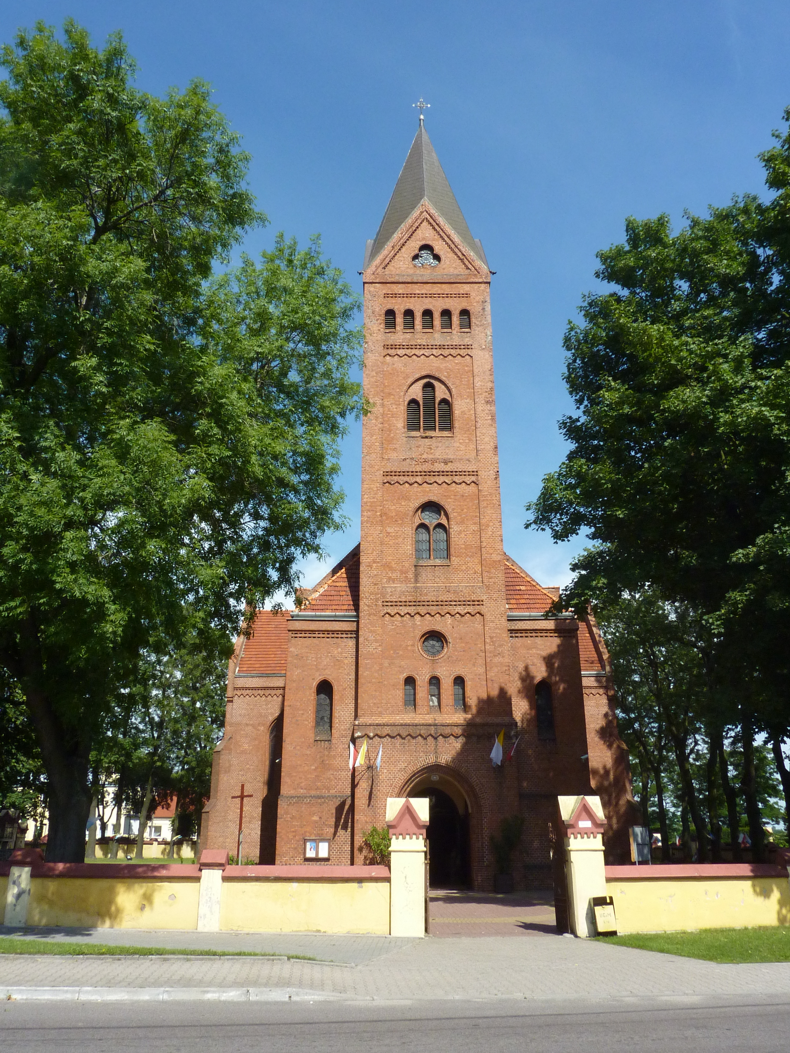 Kościół pw. Matki Boskiej Szkaplerznej w Lubrańcu (zabytek nr rejestr. A/471)